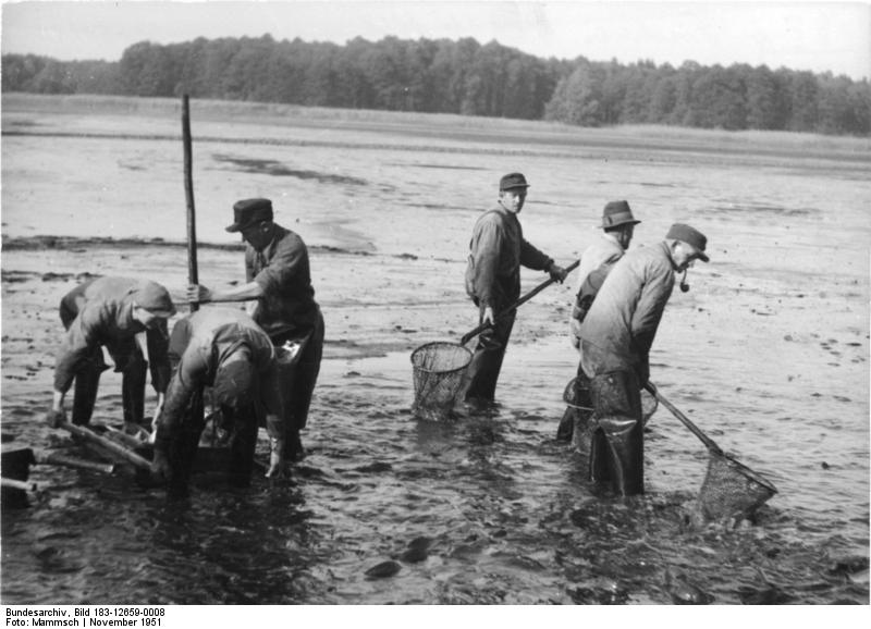 Illus/Mammsch 22.11.1951 Fischzug im Lausitzer Teichgebiet. Das umfangreichste Fisch-Teichgebiete der Deutschen Demokratischen Republik befindet sich in der Lausitz. Im Oktober, November werden die Teiche mit grossen Netzen abgefischt. Noch in keinem Jahr nach 1945 war der Fischertrag so hoch wie 1951. UBz: Beim Fischen mit Handnetzen.